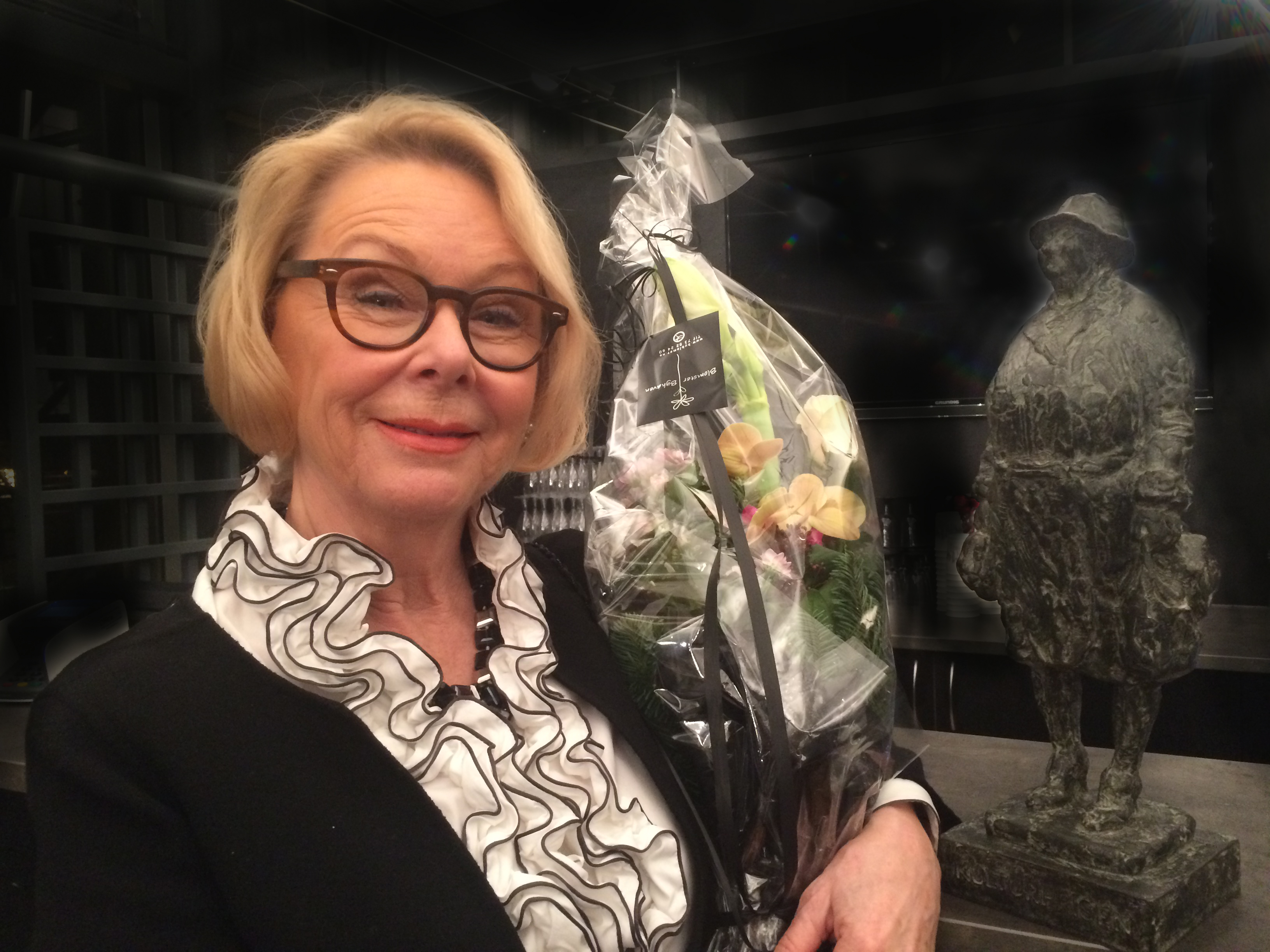 Den norske kunsthåndverkeren og designeren Lise Skjåk Bræk med blomstene og statuetten som fulgte Trondheim kommunes kulturpris 2016. Tildelt henne under Adresseavisen og TSOs nyttårskonsert 7. januar 2017